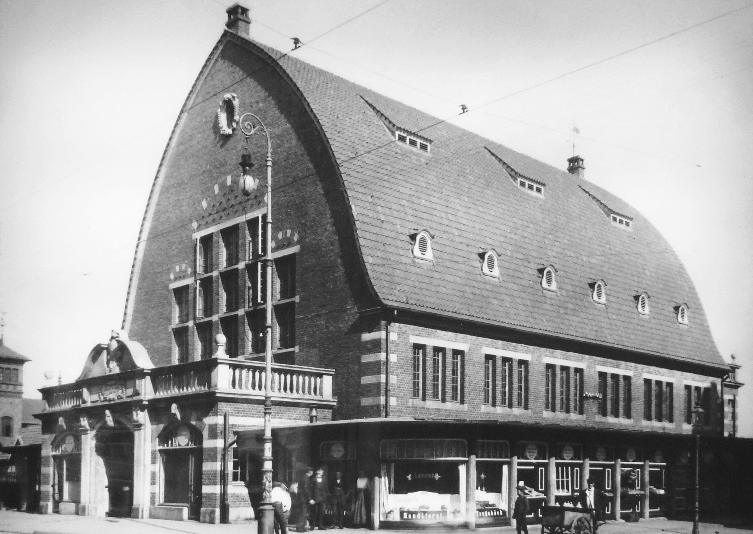 Die alte Fischauktionshalle in Kiel, heute "Schifffahrtsmuseum Kiel"